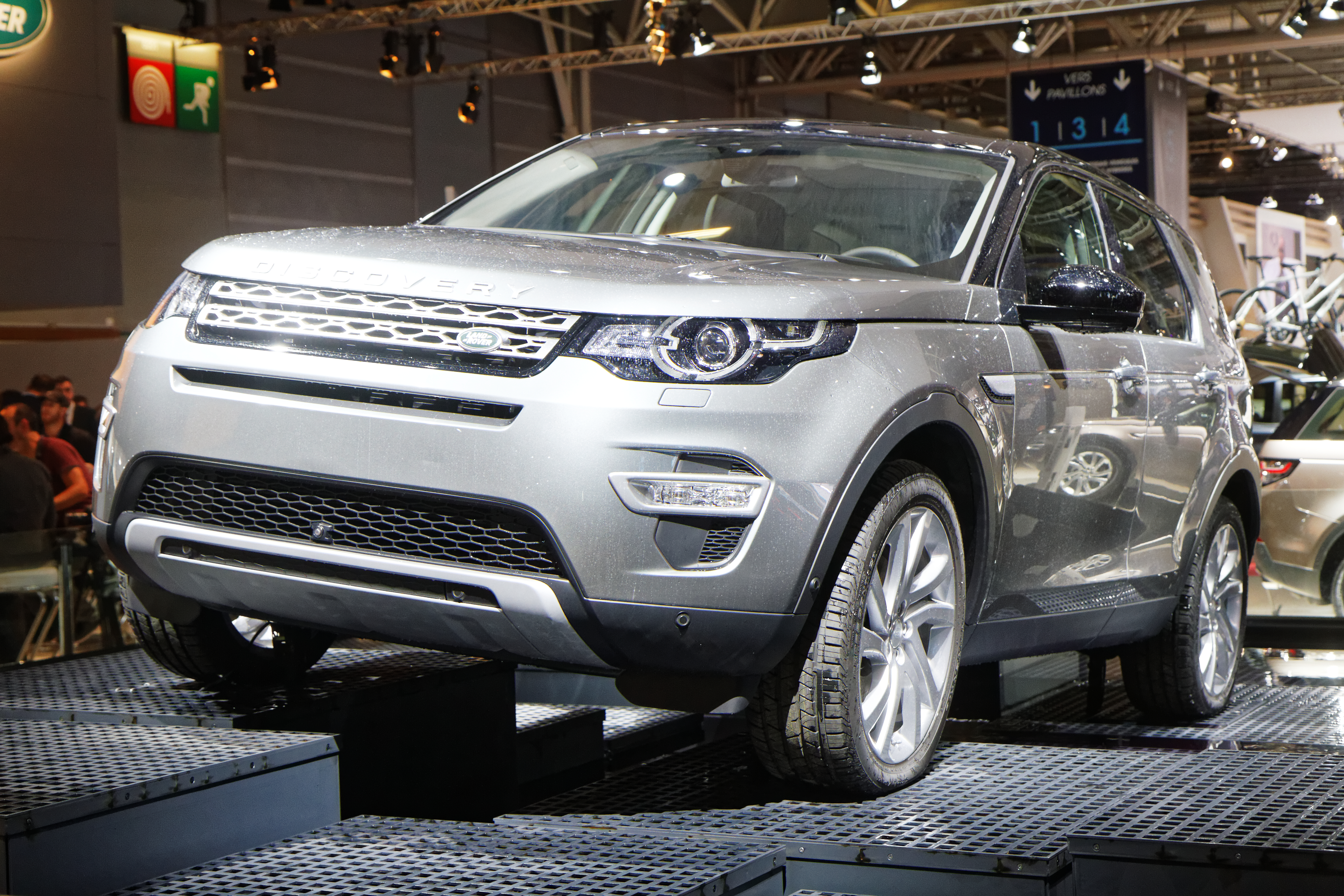 Une Land Rover Discovery présentée lors du mondial de l'automobile de Paris 2014.